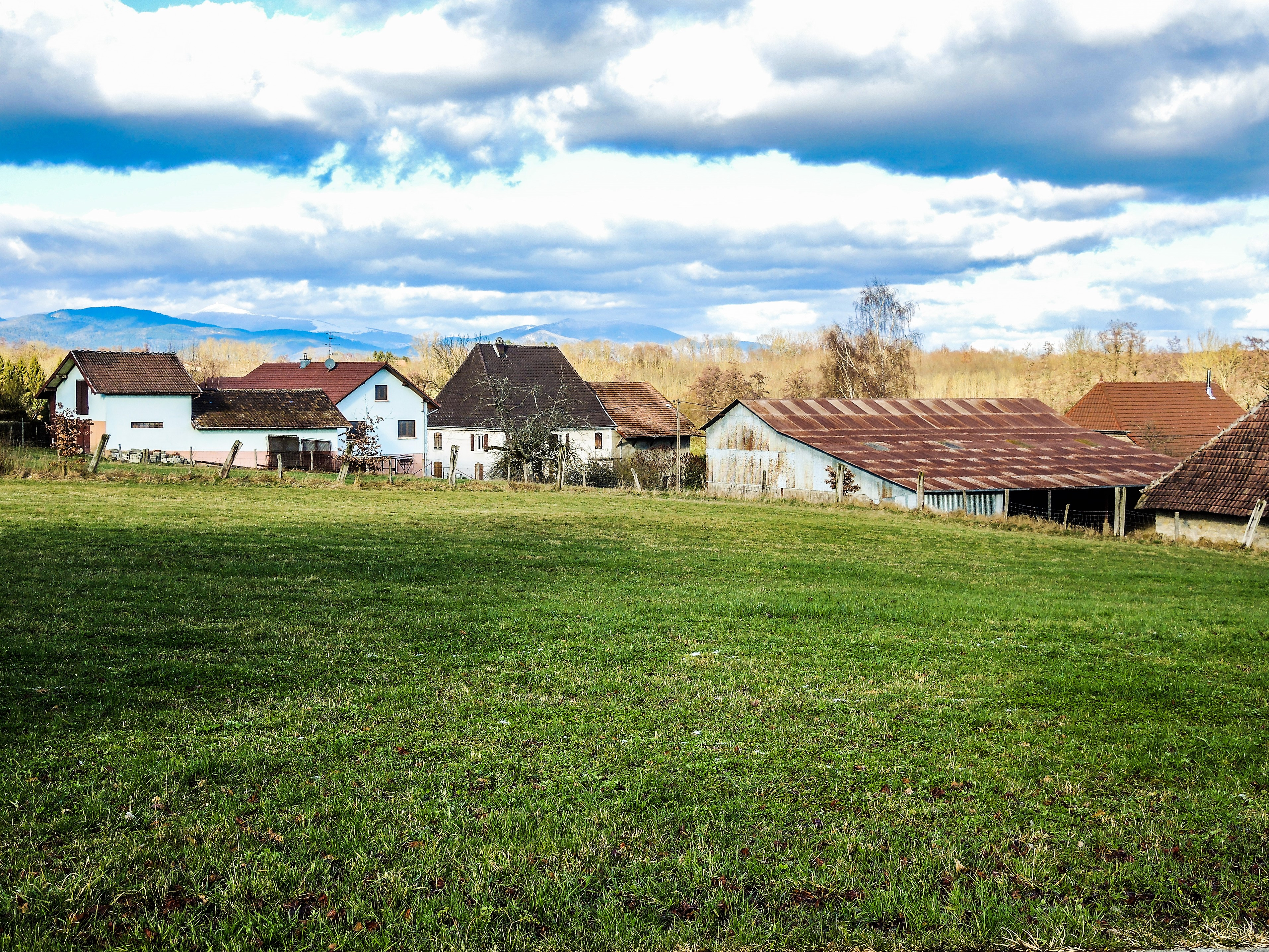 Côté nord du village d'Angeot, vu du parvis de l'église. Territoire de Belfort.